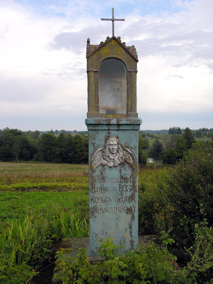 Kegriai, Mažeikių raj., Viekšnių seniūnija Koplytstulpis Foto: Algirdas, 2006 m. rugpjūčio 15 d., Lietuva